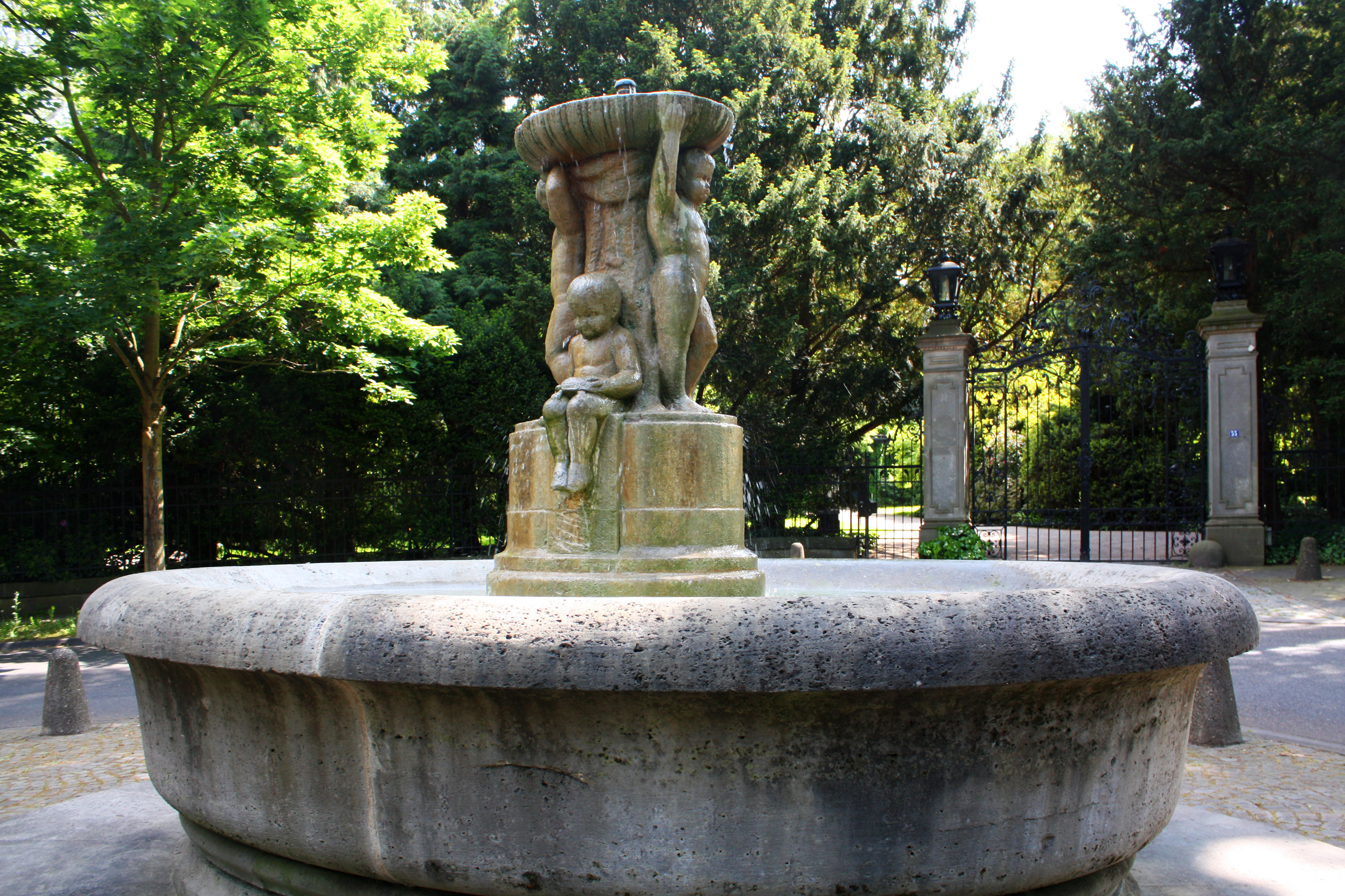 Puttenbrunnen eines unbekannten Künstlers (1906/07) an der Parkstraße vor der Marienburg in Köln-Marienburg; hinten das Eingangstor der Marienburg